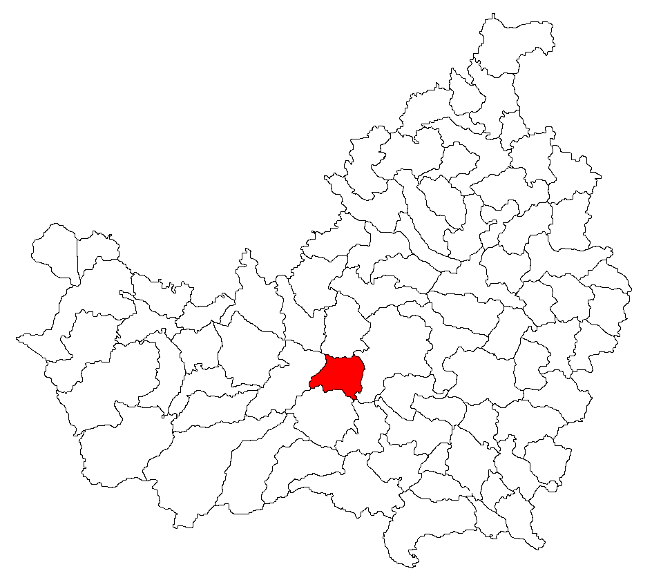 Categorie:Hărţi ale judeţului Cluj